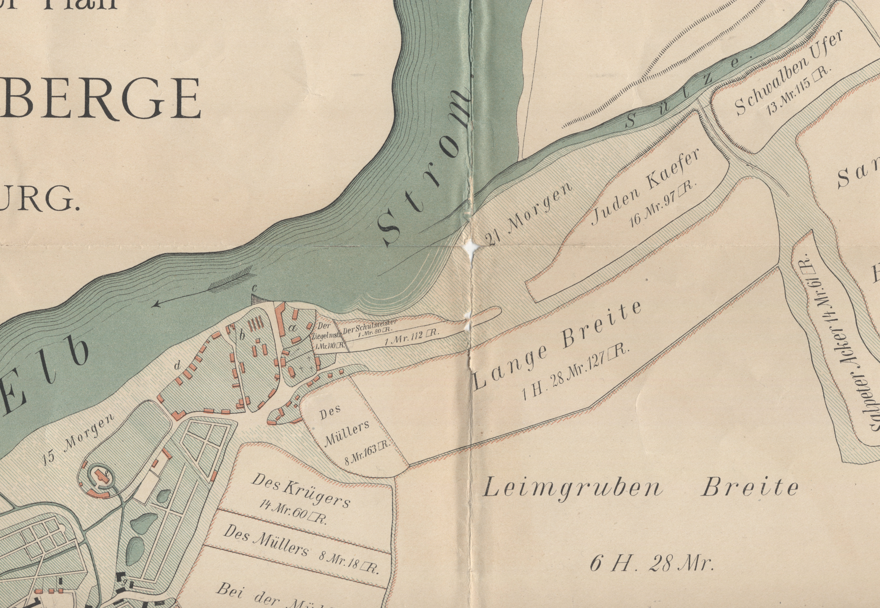 Ausschnitt einer Karte von Buckau, Karte nicht eingenordet, Norden ist links